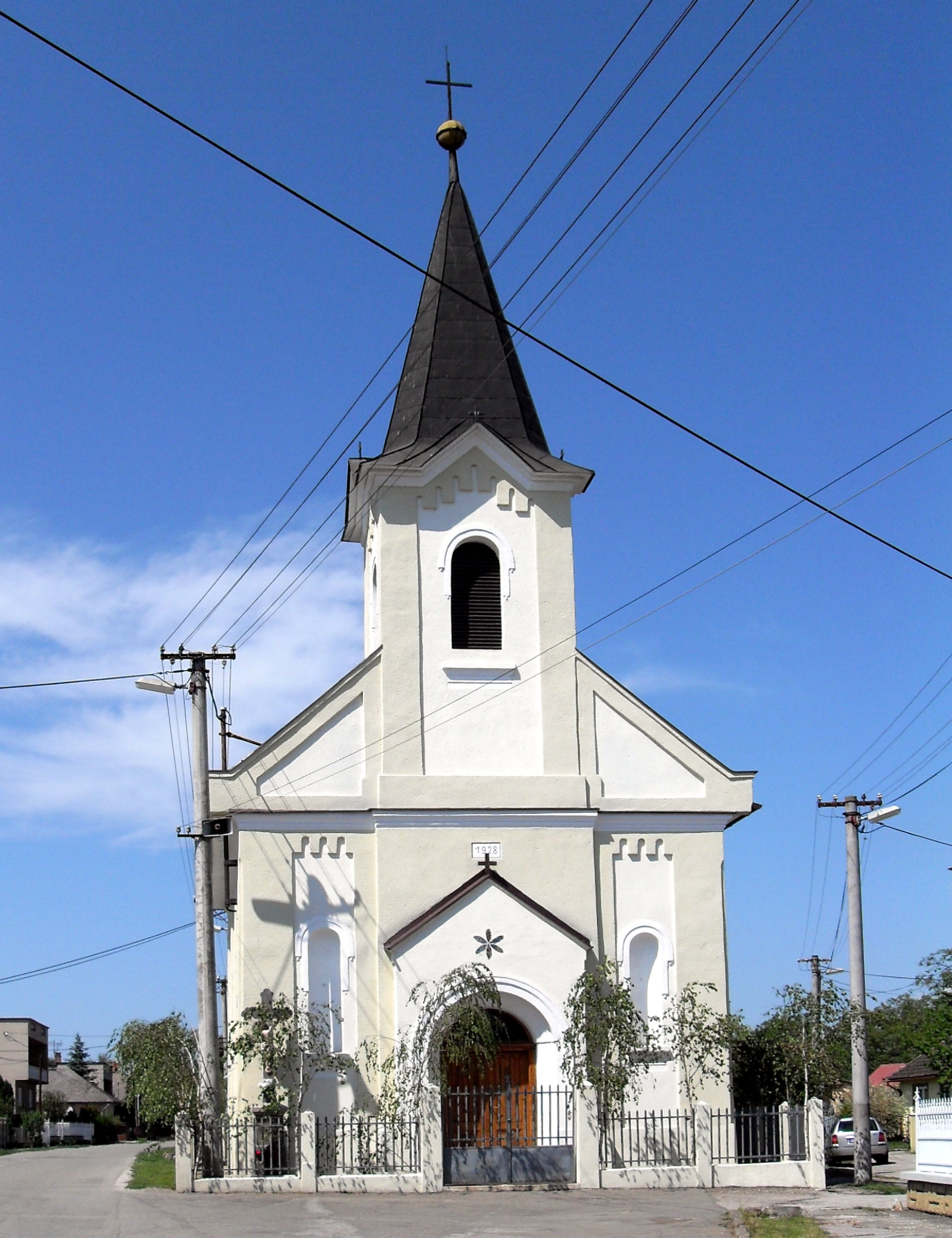 Komárovce kostol reformovanej cirkvi